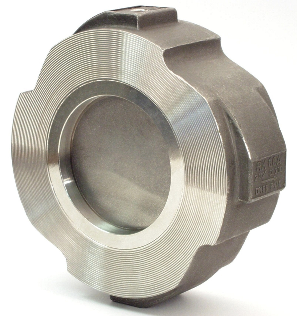 Дисковый клапан